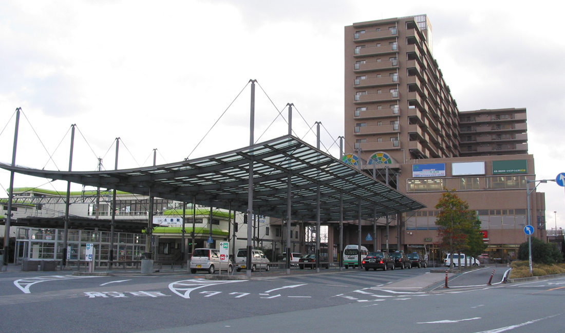 近鉄ja:久居駅西口。右の建物がポルタ久居。2007/01/07 投稿者が撮影